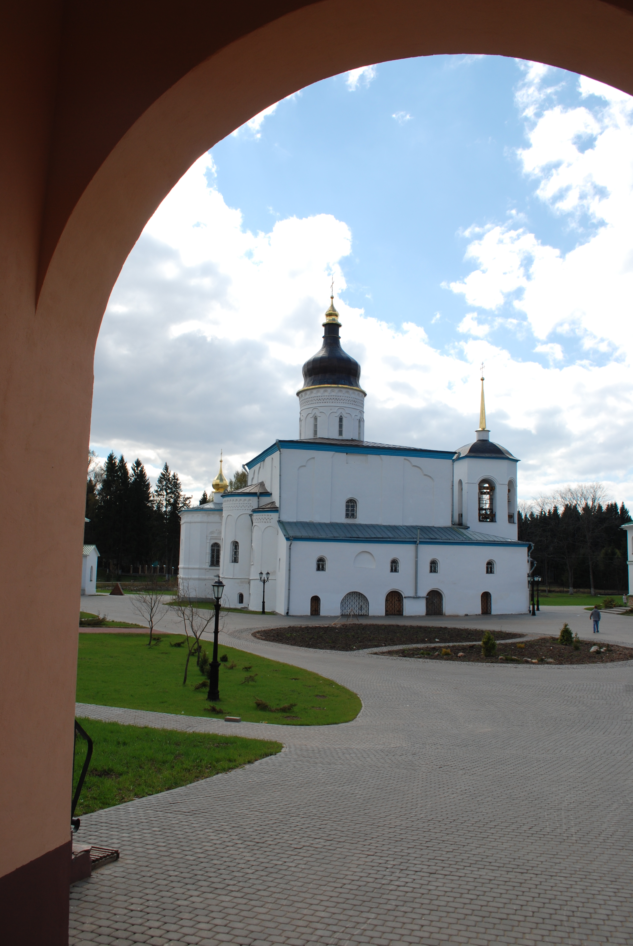 Монастырь Спасо-Елизаровский (Псковская область, Псков, село Елизарово)